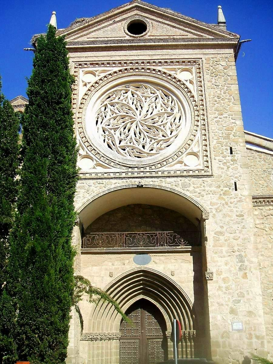 Iglesia de Santa Maria la Mayor (La Colegial), Talavera de la Reina (Toledo)